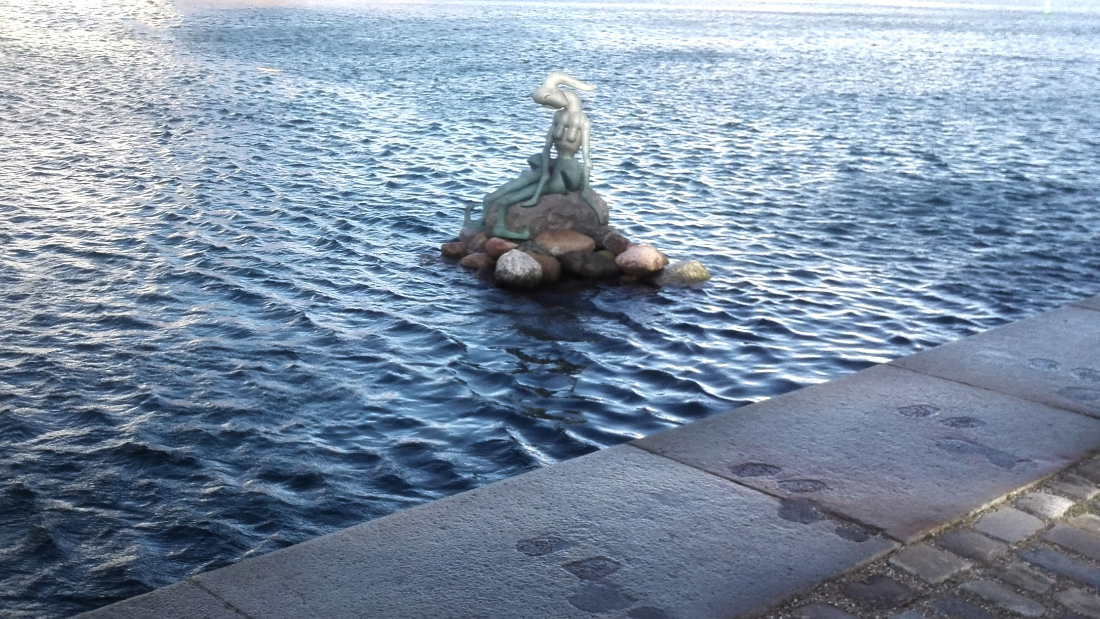 Det genmodificerede Paradis på Pakhuskaj, København